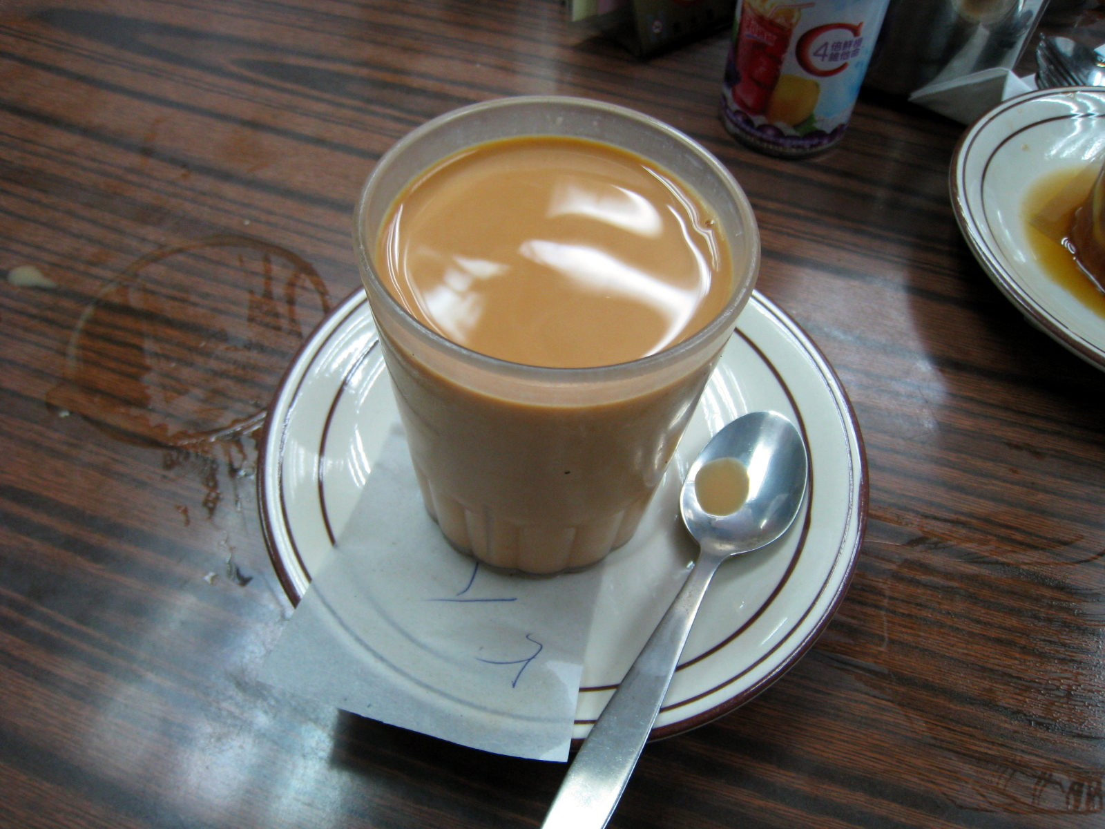 Hong Kong-style Milk Tea